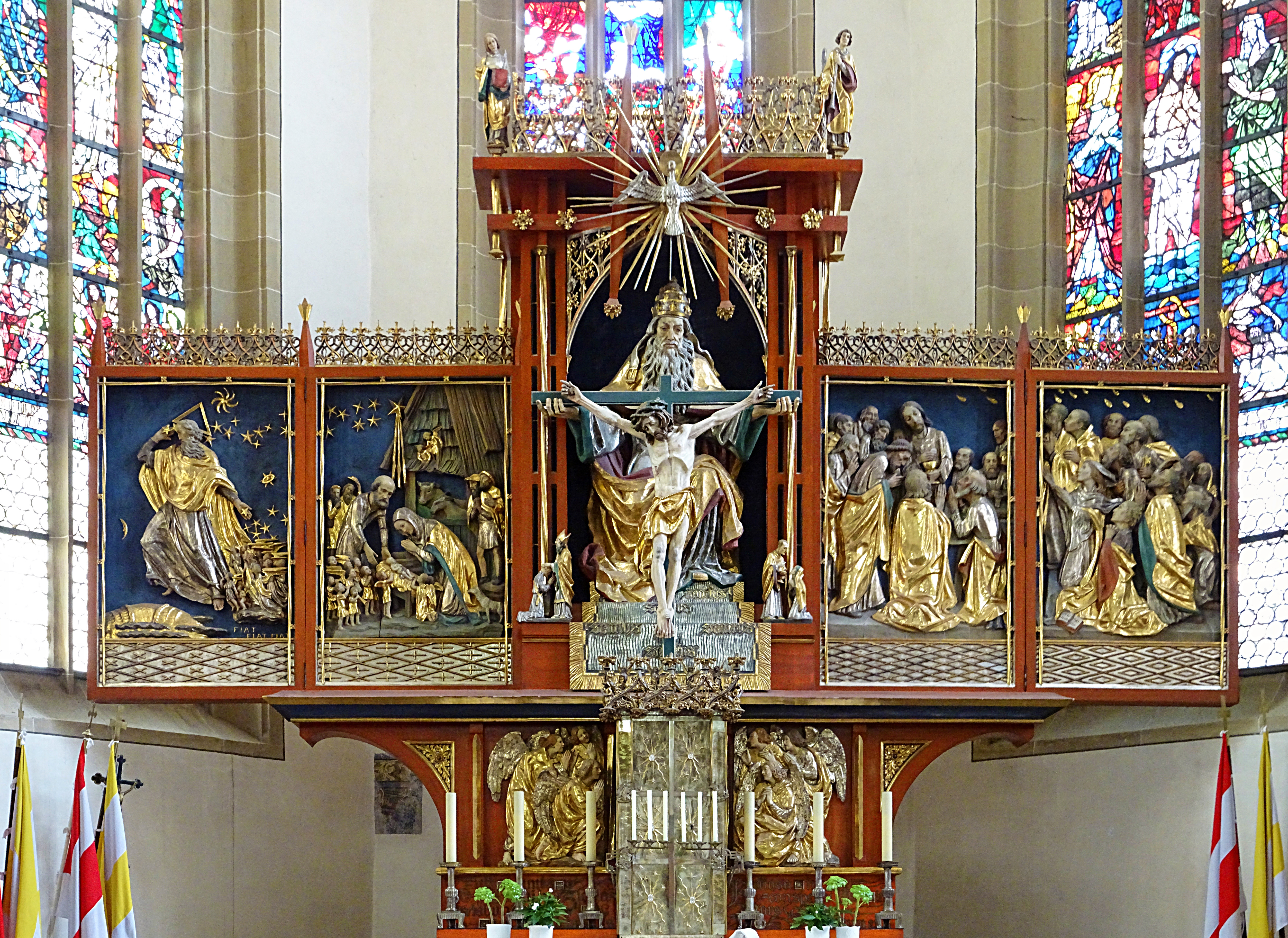 Vierflügliger Hochaltar in der Stadtpfarrkirche Mariä Himmelfahrt (Bad Königshofen im Grabfeld), 1935 von Thomas Buscher begonnen und nach dessen Tod (1937) von A. Weckbecker bis 1939 fertiggestellt. Auf vier Bildtafeln wird die Erschaffung der Erde dargestellt, die Geburt Christi, das letzten Abendmahl und die Sendung des Heiligen Geistes. Überragt wird dies alles von der Majestät der heiligen Dreifaltigkeit, wobei Gott Vater seinen Sohn am Kreuz den Menschen buchstäblich entgegenstreckt.[1]